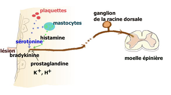 Neurone nociceptif et sérotonine (adapté de Kandel et al. 2000)